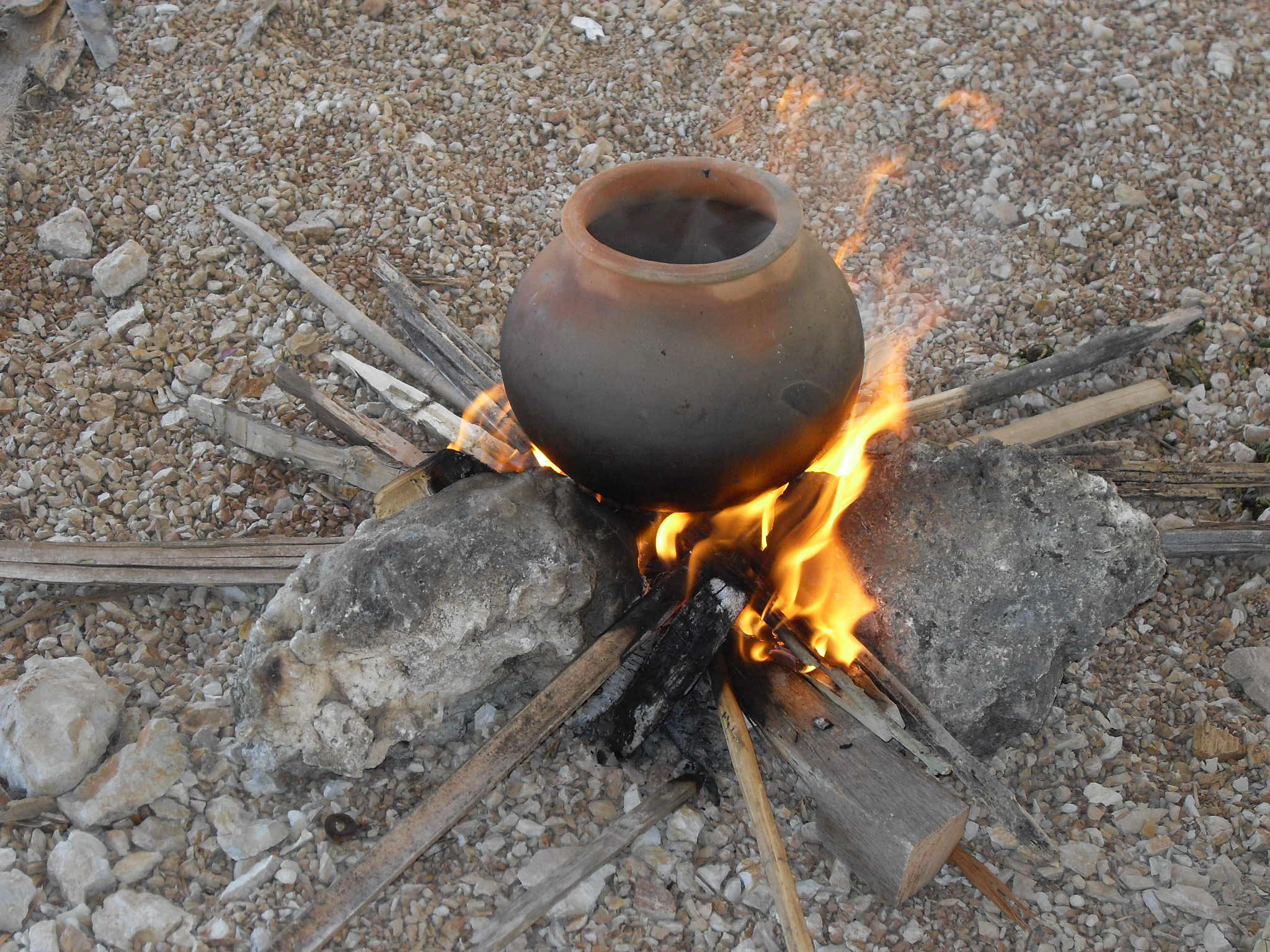 Tonkrug in Osttimor